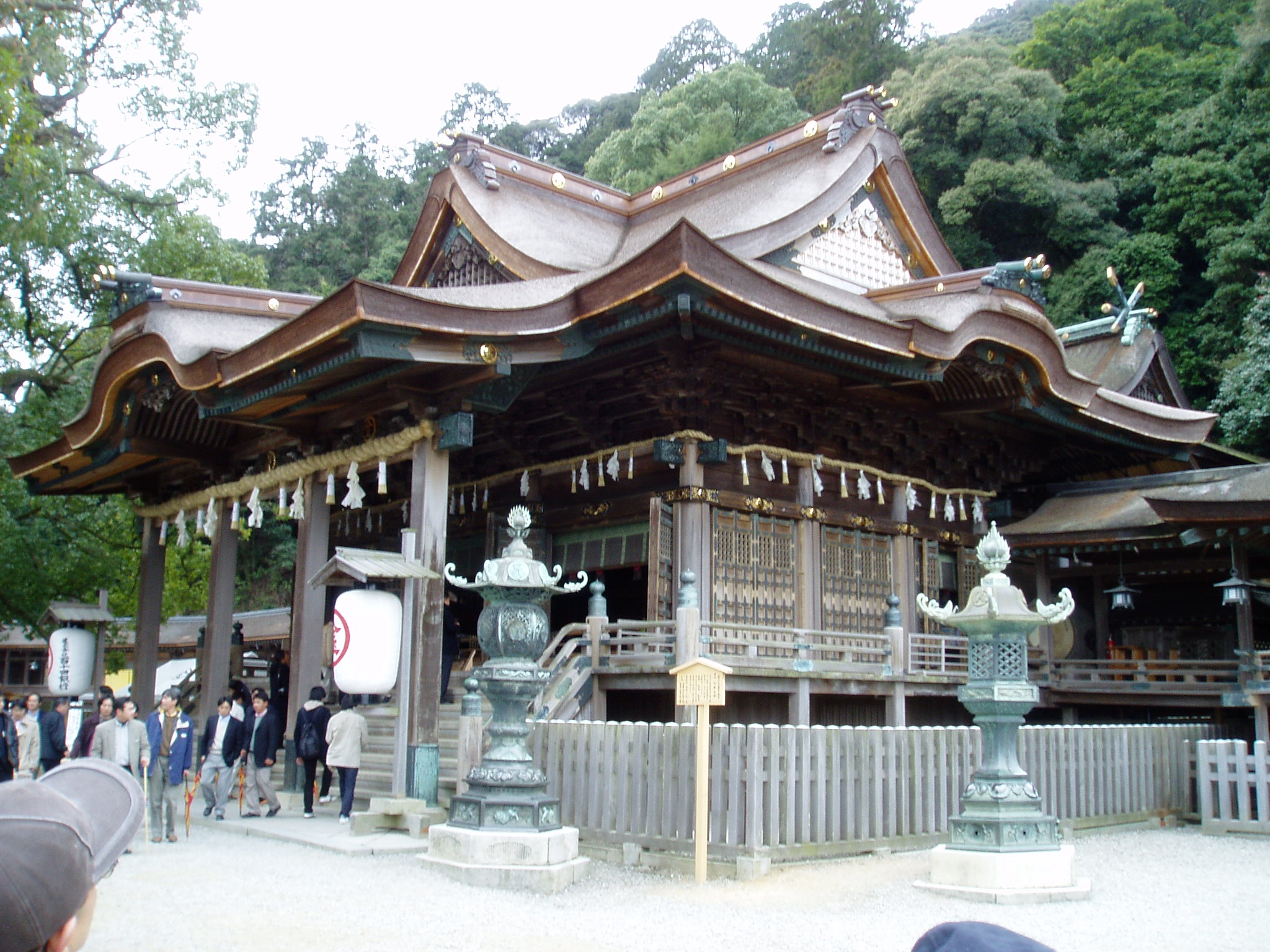 the Main Shrine (Hon-gu; 本宮) at Kotohira-gu (金刀比羅宮) in Kotohira, Nakatado, Kagawa, Japan.